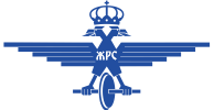 Logo der Željeznice Republike Srpske (ŽRS), der Bahngesellschaft Republika Srpska